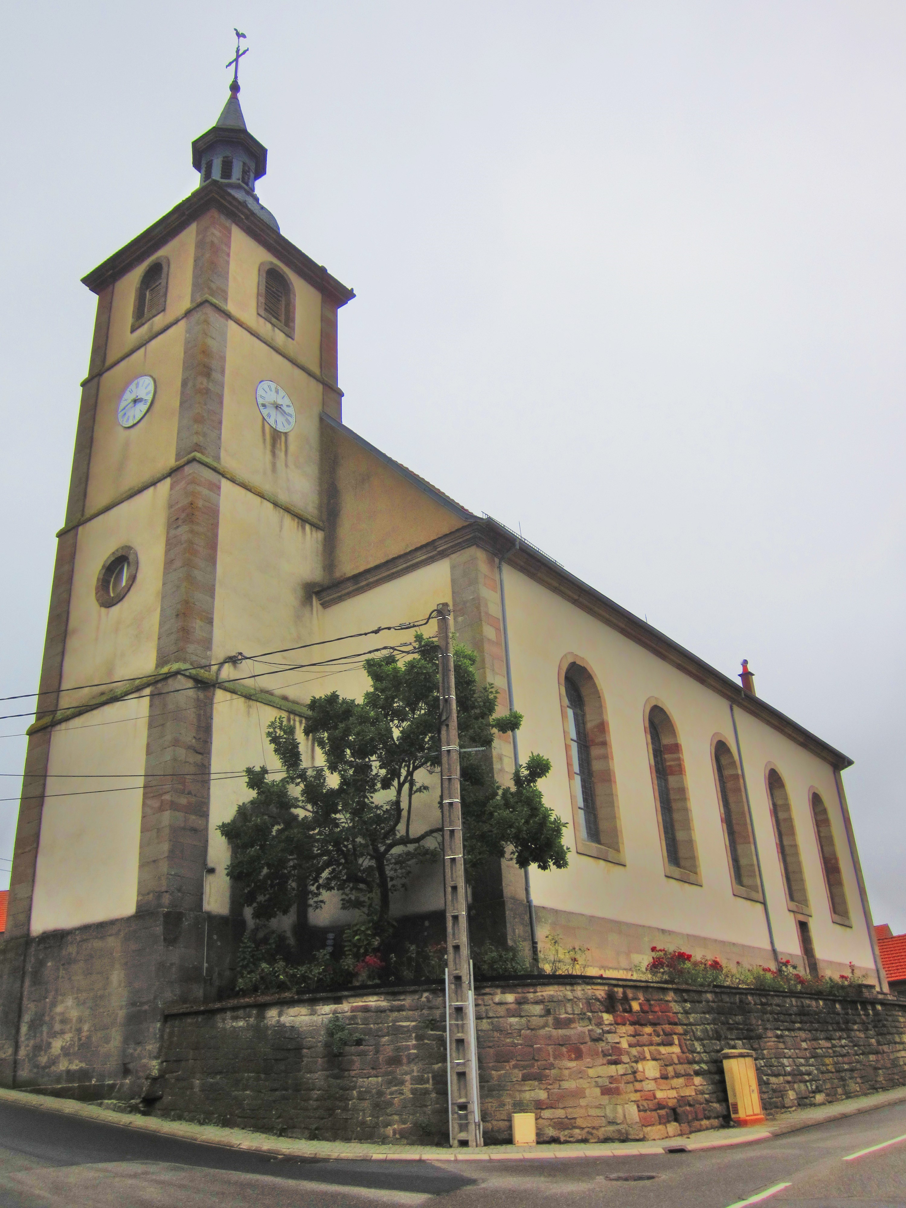 Temple Hangviller